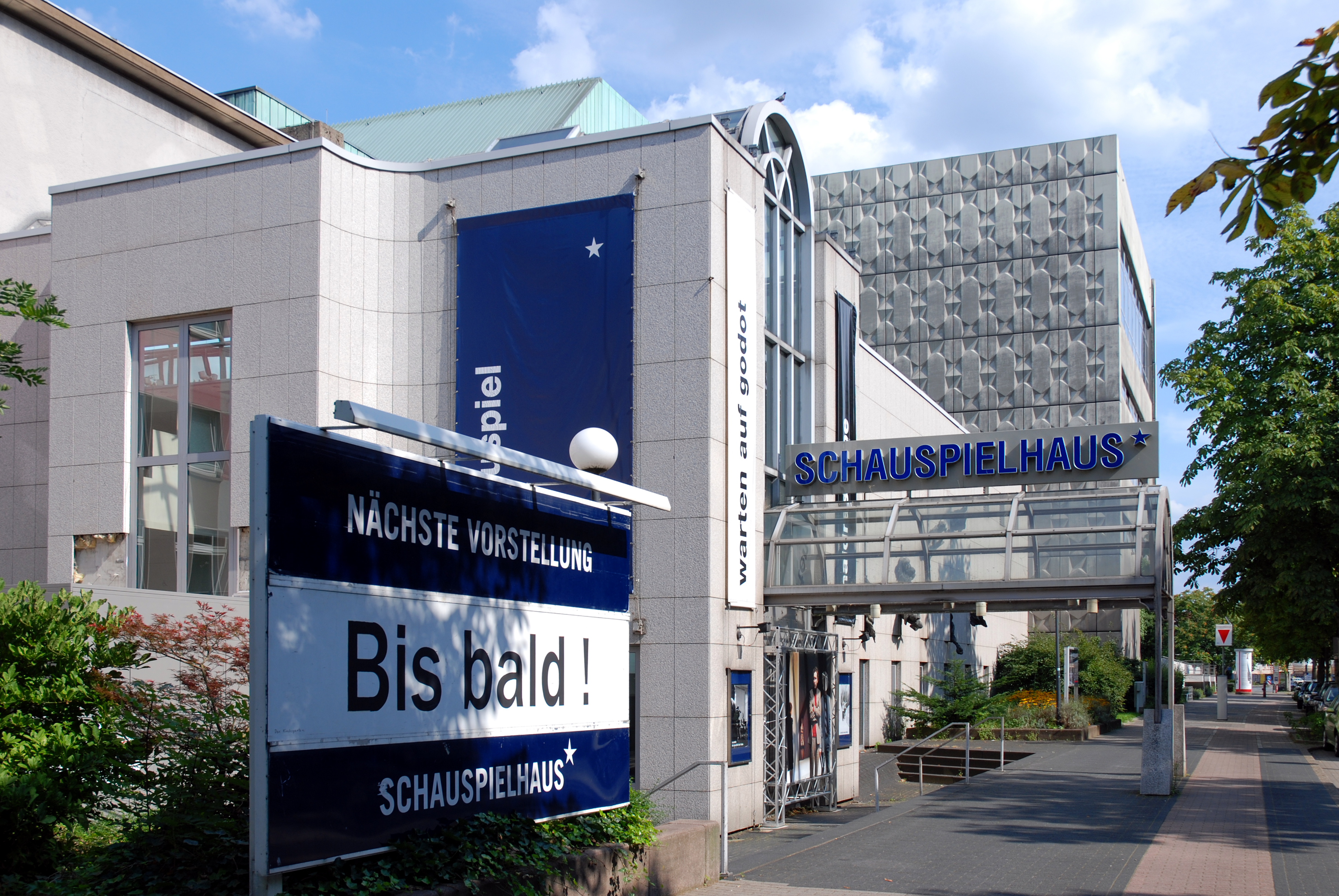 Dortmund, Stadttheater, Schauspielhaus, Haupteingang, Blickrichtung Ost